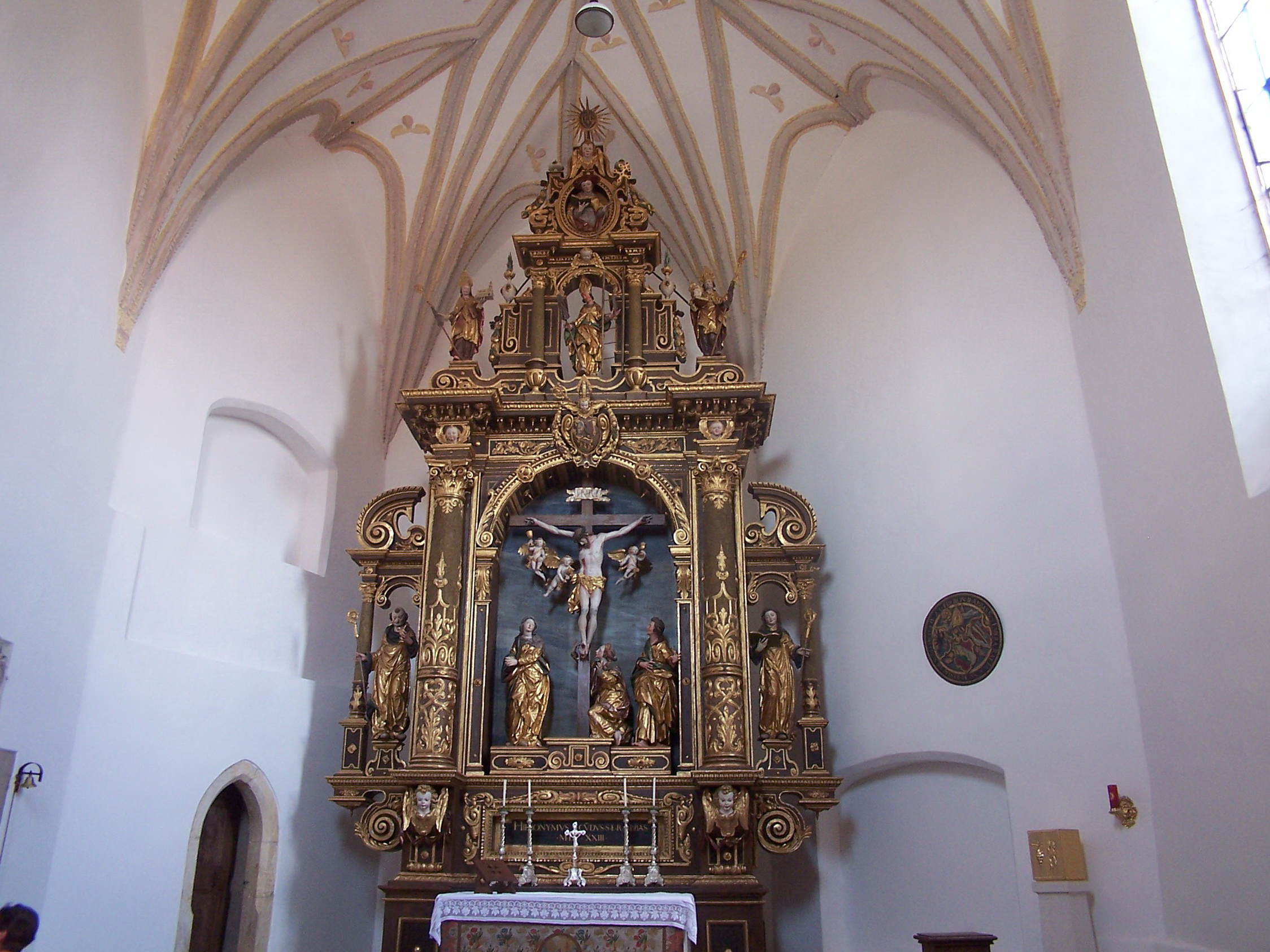 Geiselhöring, Haindling 16b, Katholische Filialkirche Hl. Kreuz, klassizistischer Altar